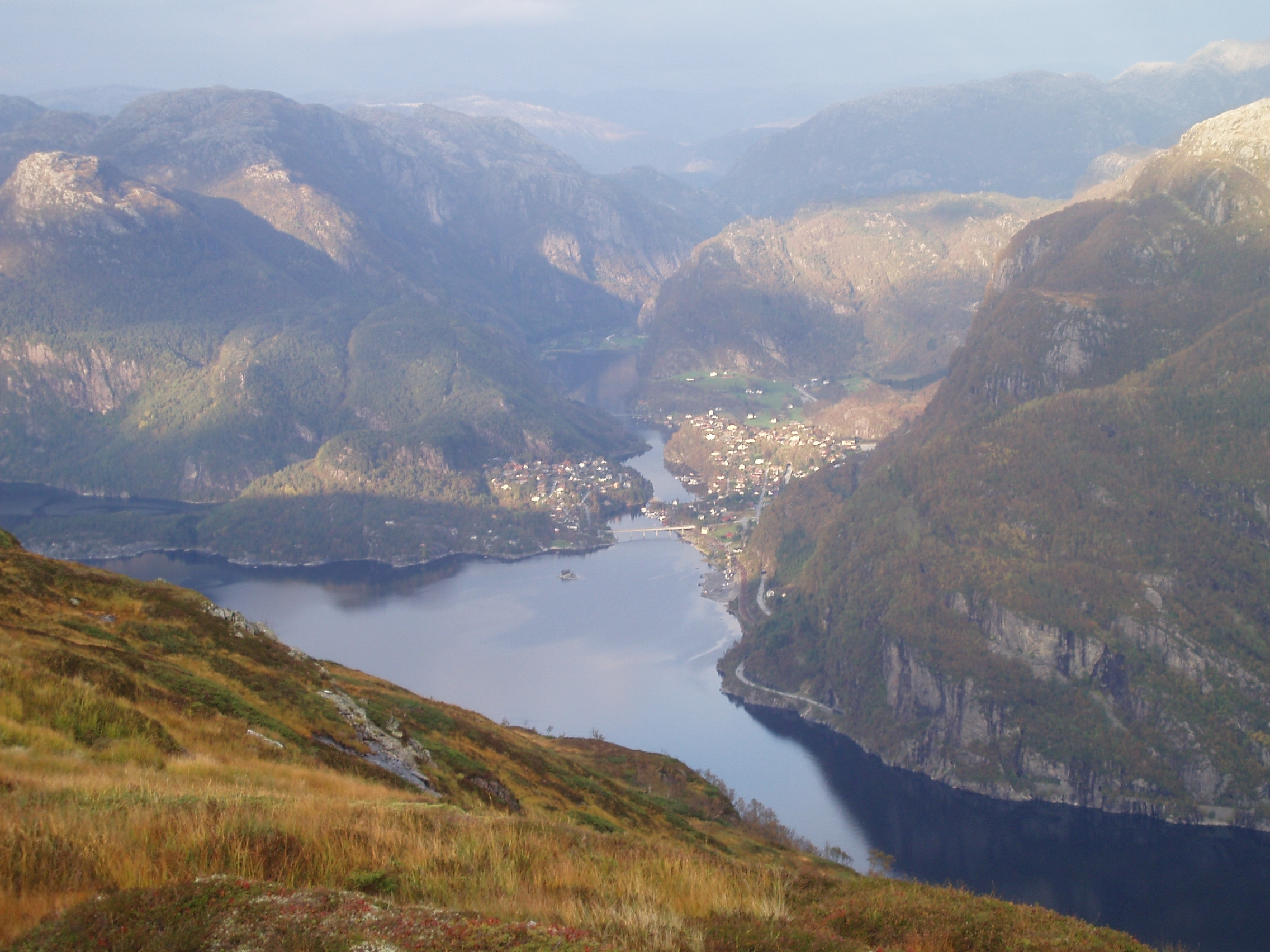 Bilete av Stanghelle tatt frå Osterøy/Rispingen.